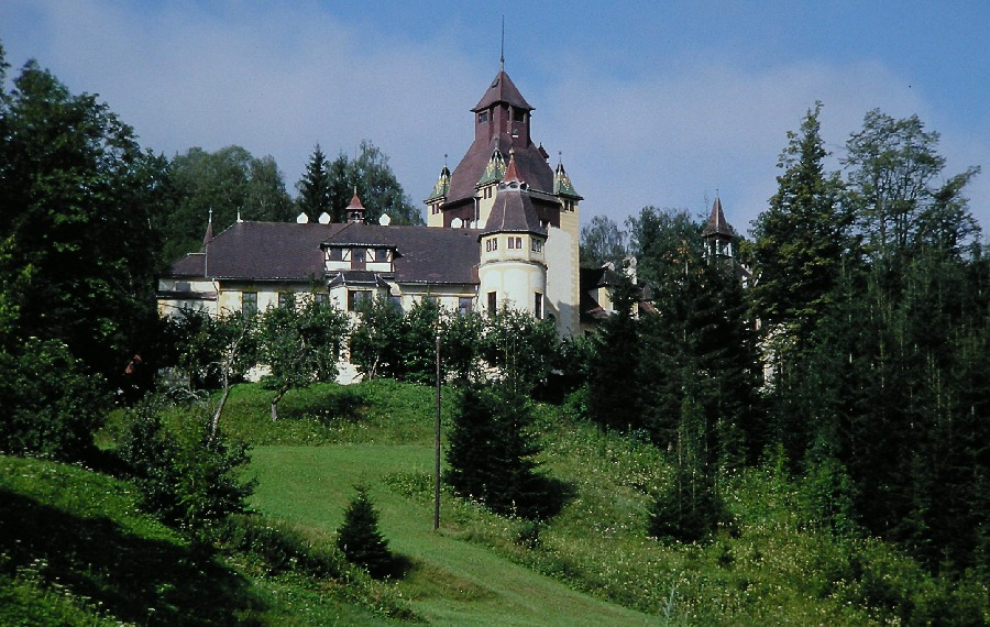 Schloss Kassegg im Nördlichen Gesäuse